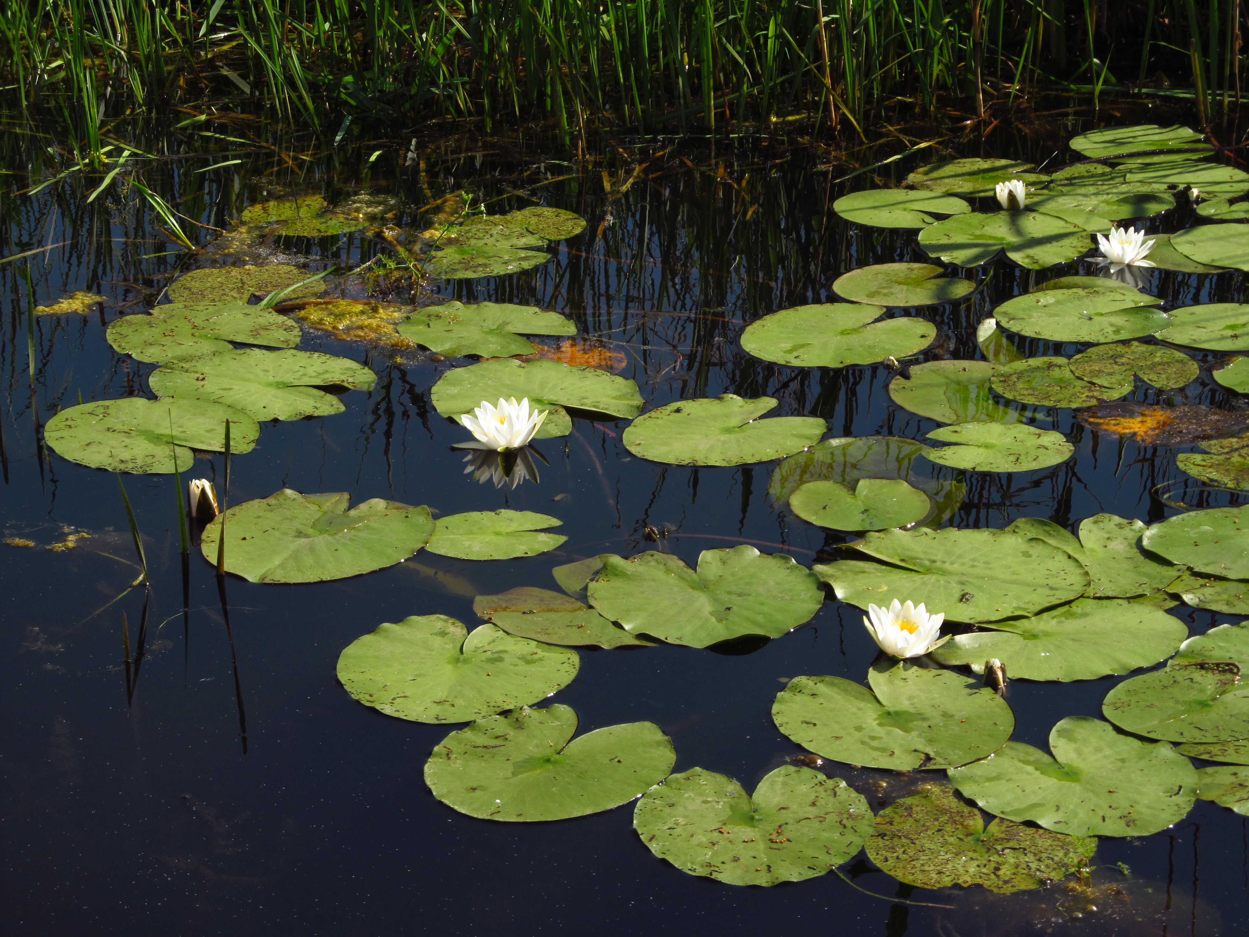 Srpski (latinica): beli lokvanj (Nymphaea alba)